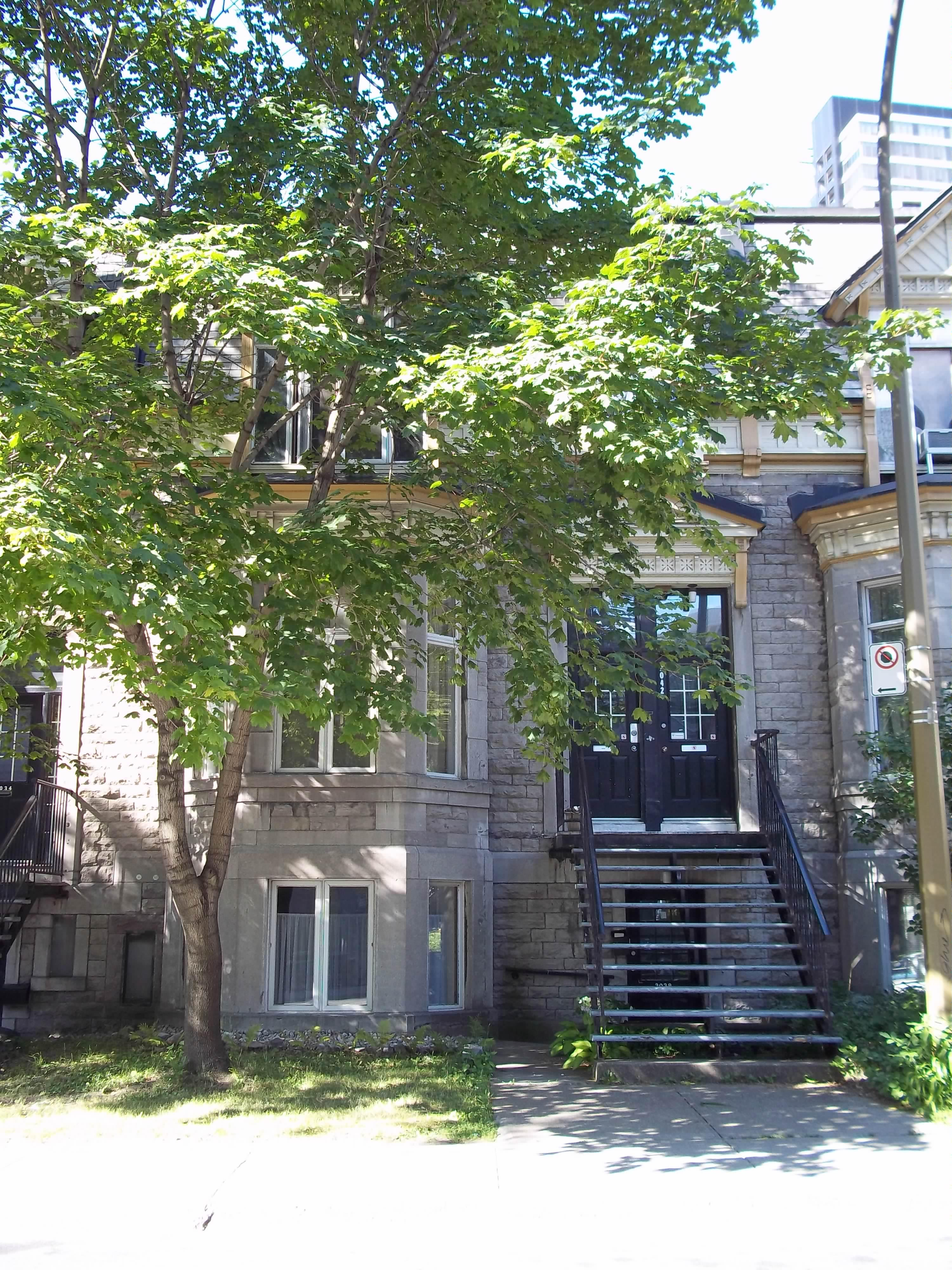 Maison Thomas-Fraser, 2040, rue Jeanne-Mance, Montréal